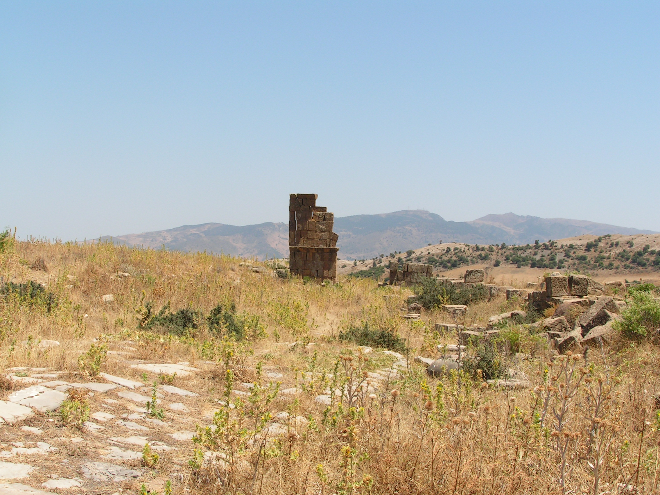 Ansicht Announa